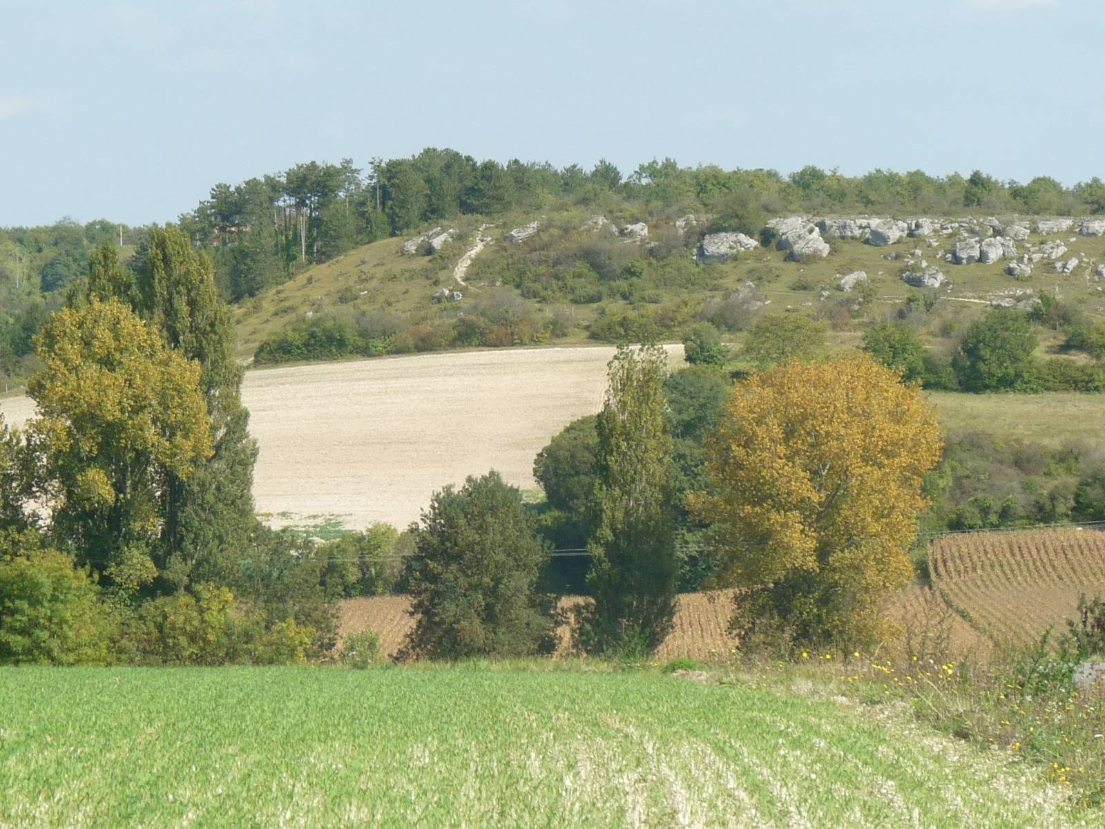 Chaumes de Vignac à Roullet (16), France. Cuesta du Turonien